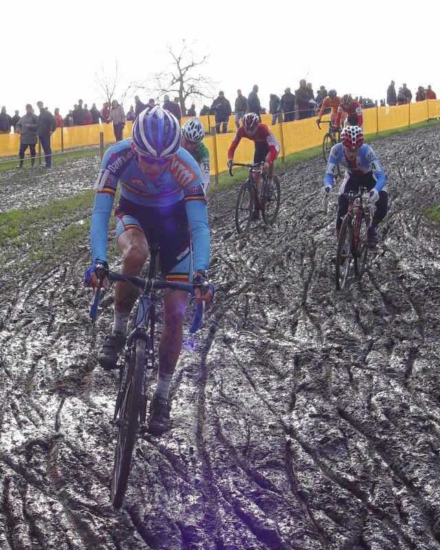 Dieter Vanthourenhout in de Wereldbeker manche van Hoogerheide 2007